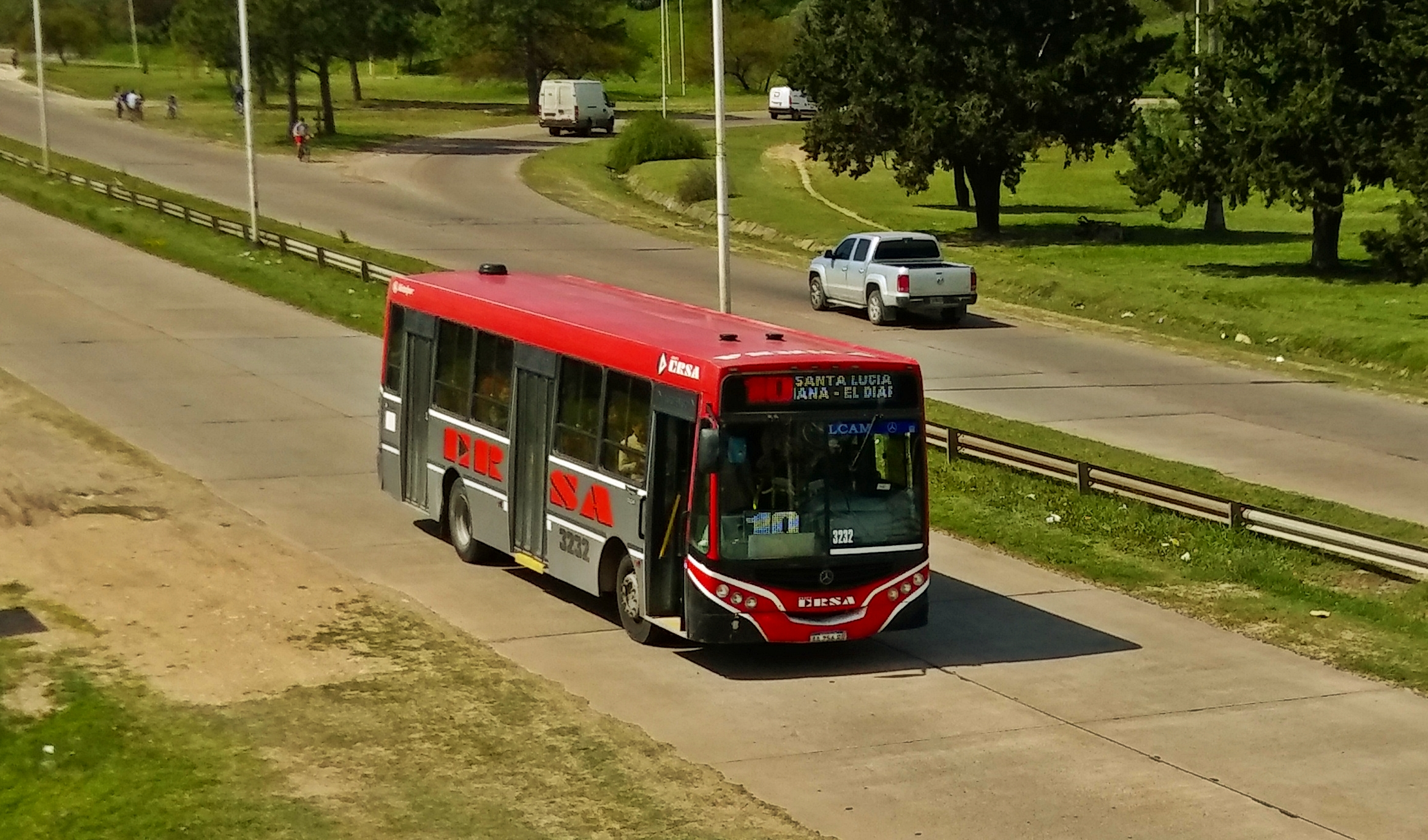 ERSA Urbano Paraná Línea 10 - Interno 3232 Metalpar Tronador II Mercedes-Benz OF1418 con Rampa